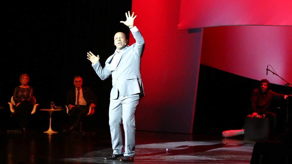 São Paulo (SP) | Ministério da Cultura celebra a Ordem do Mérito Cultural 2013. Na foto: interpretação de Aílton Graça. 05.11.2013 Foto: Elisabete Alves